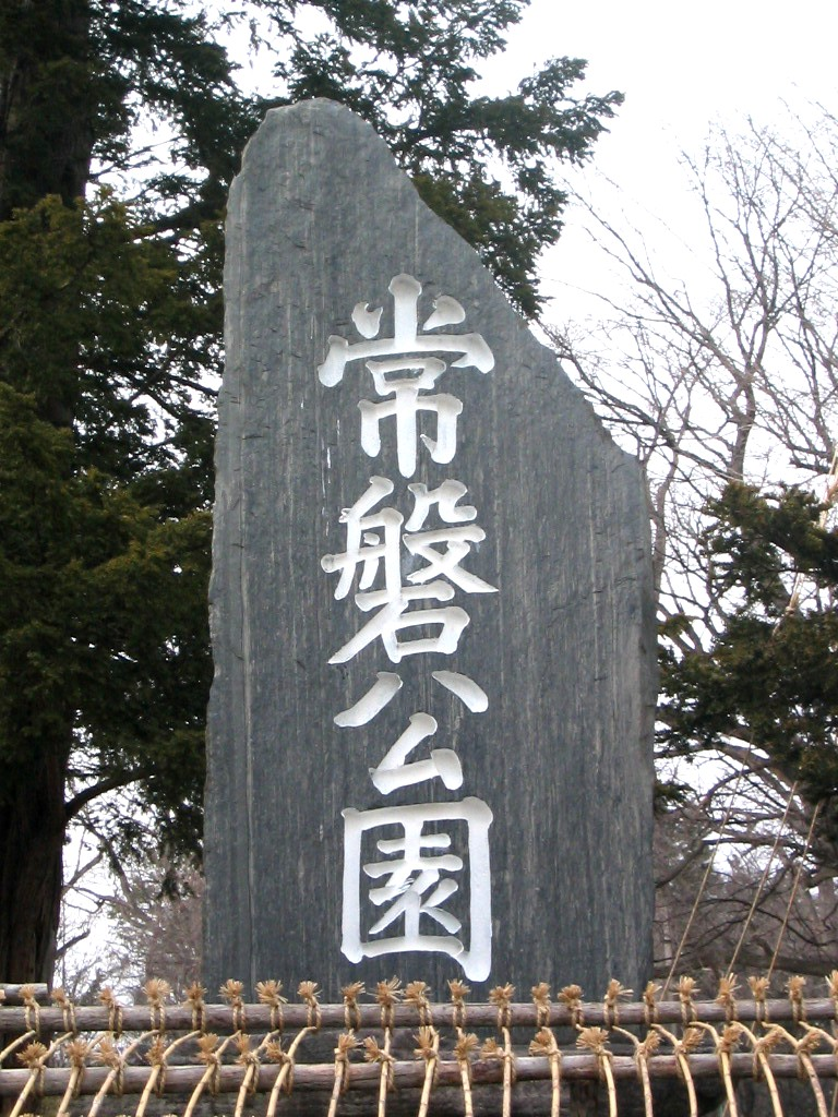 作成者が撮影 撮影年月日：2010年4月17日 北海道旭川市「常磐公園碑」